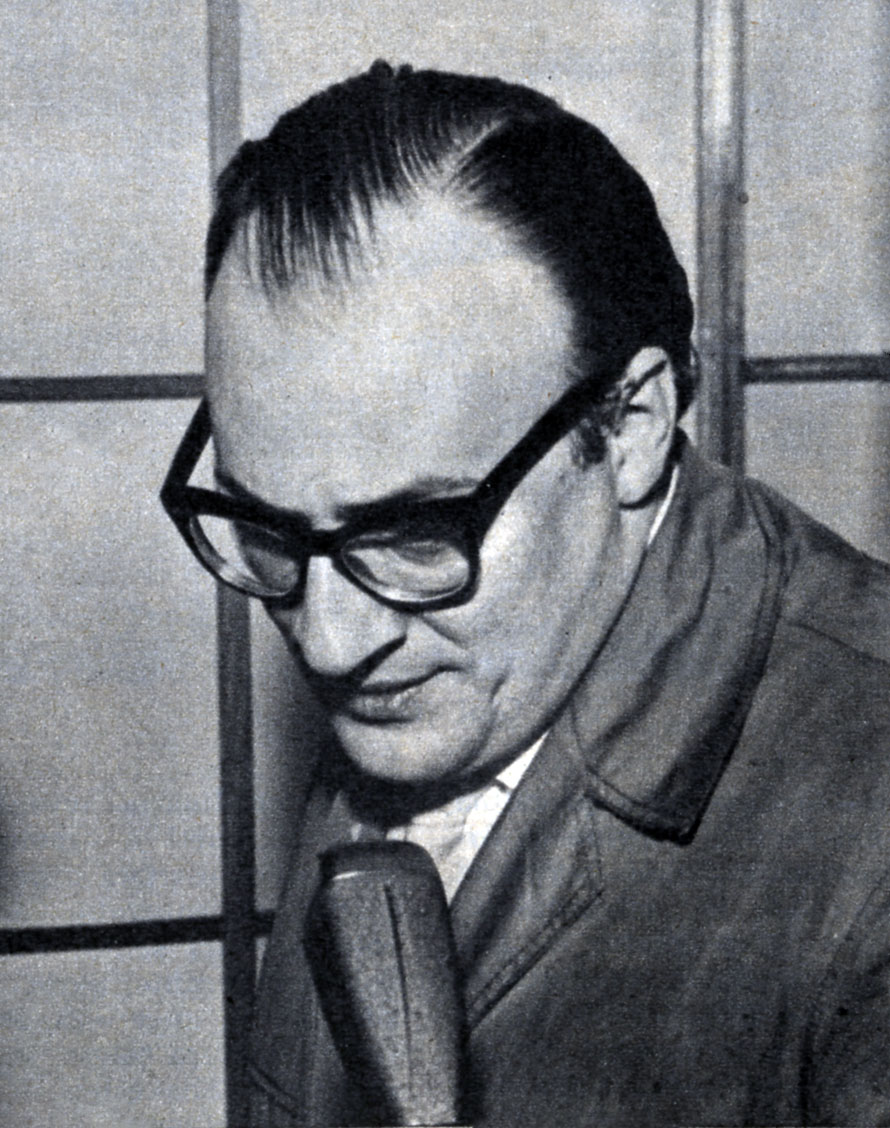 photo from magazine Radiocorriere (1959)